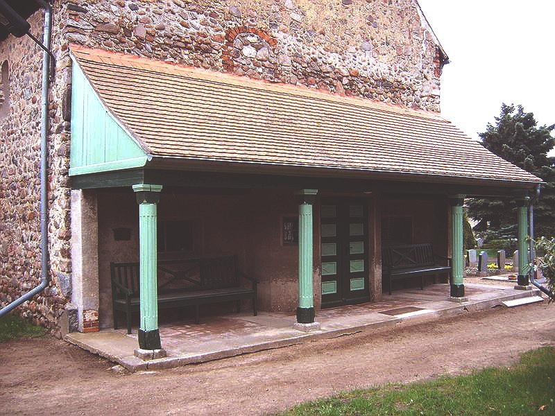 westlicher Vorbau an der Dorfkirche Hohenseeden, Sachsen-Anhalt, Deutschland - Bild aufgenommen am 27.4.2006 durch Olaf Meister Bildqualität verbessert durch Picman